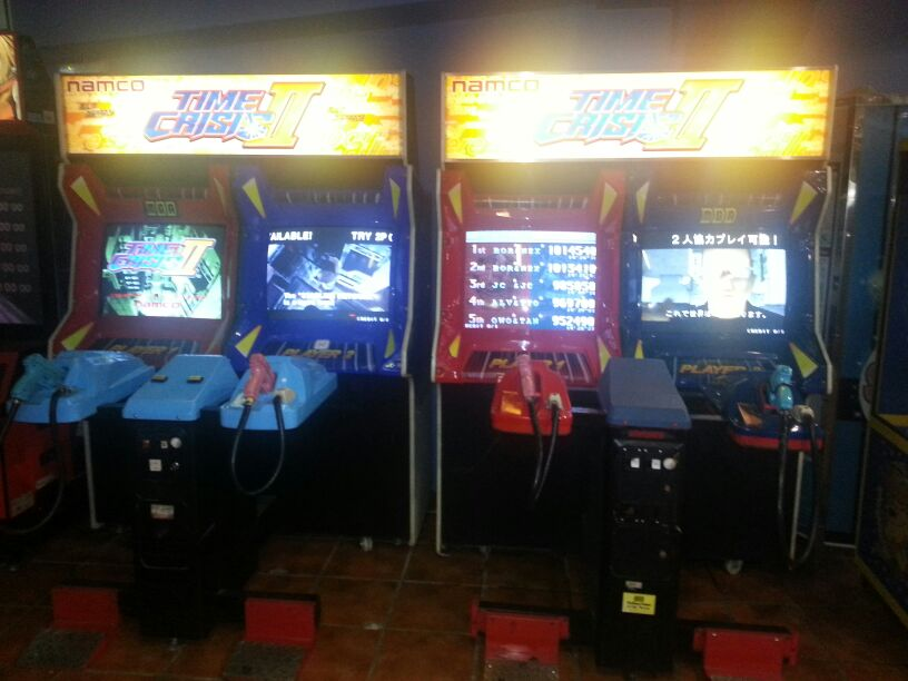 Màquines arcade